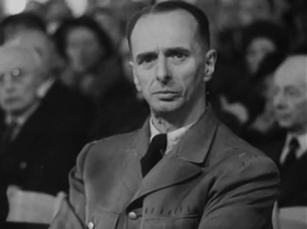 Hanns Albin Rauter (1895-1949)